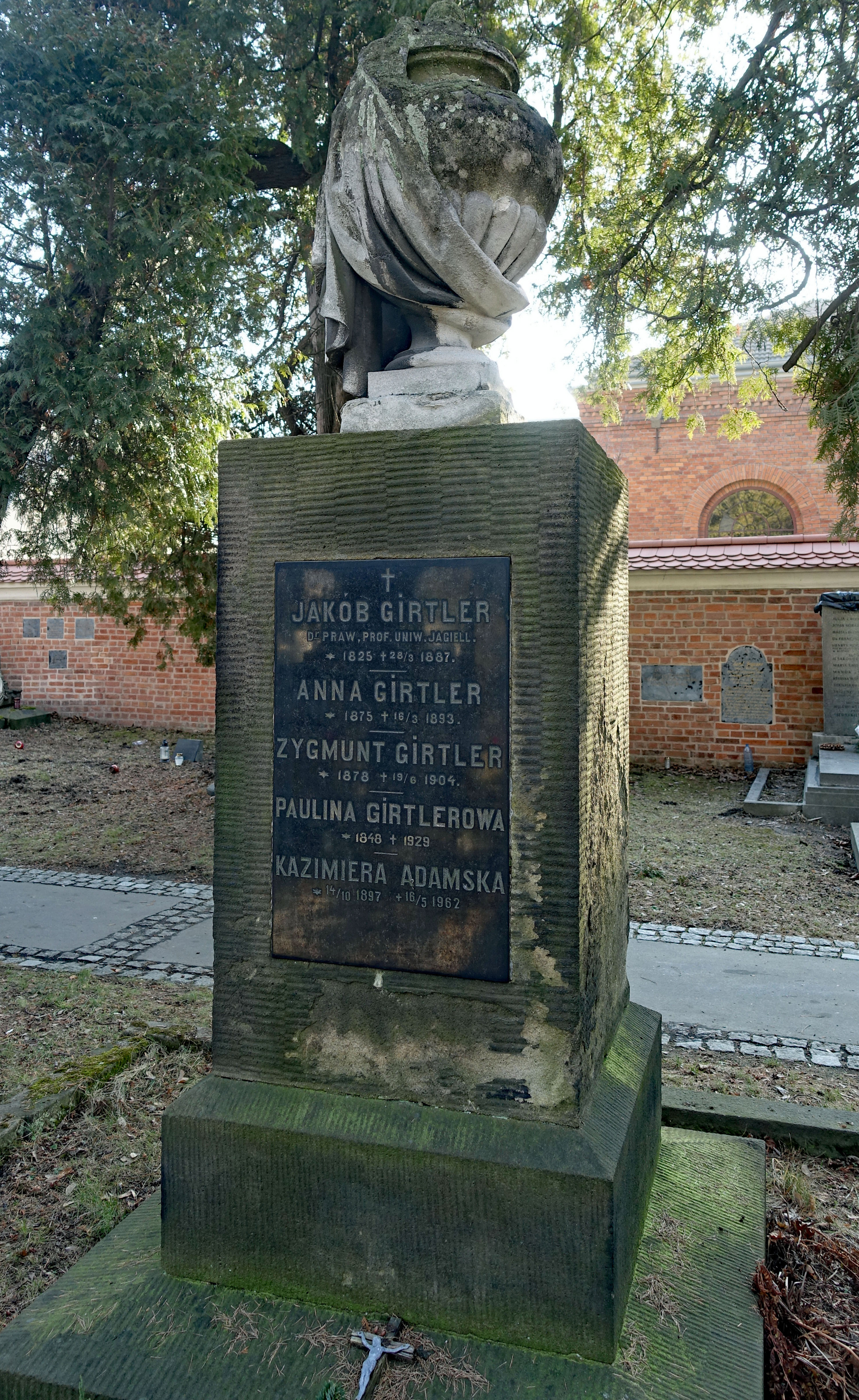 Nagrobek Jakuba Girtlera (1825–1887), profesora prawa Uniwersytetu Jagiellońskiego, na cmentarzu Rakowickim w Krakowie